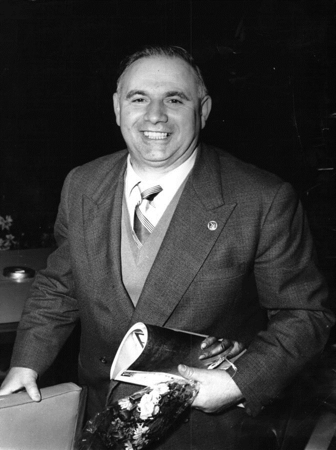 Enrico Bonazzi (1912-2002), segretario della federazione bolognese del PCI negli anni 1950